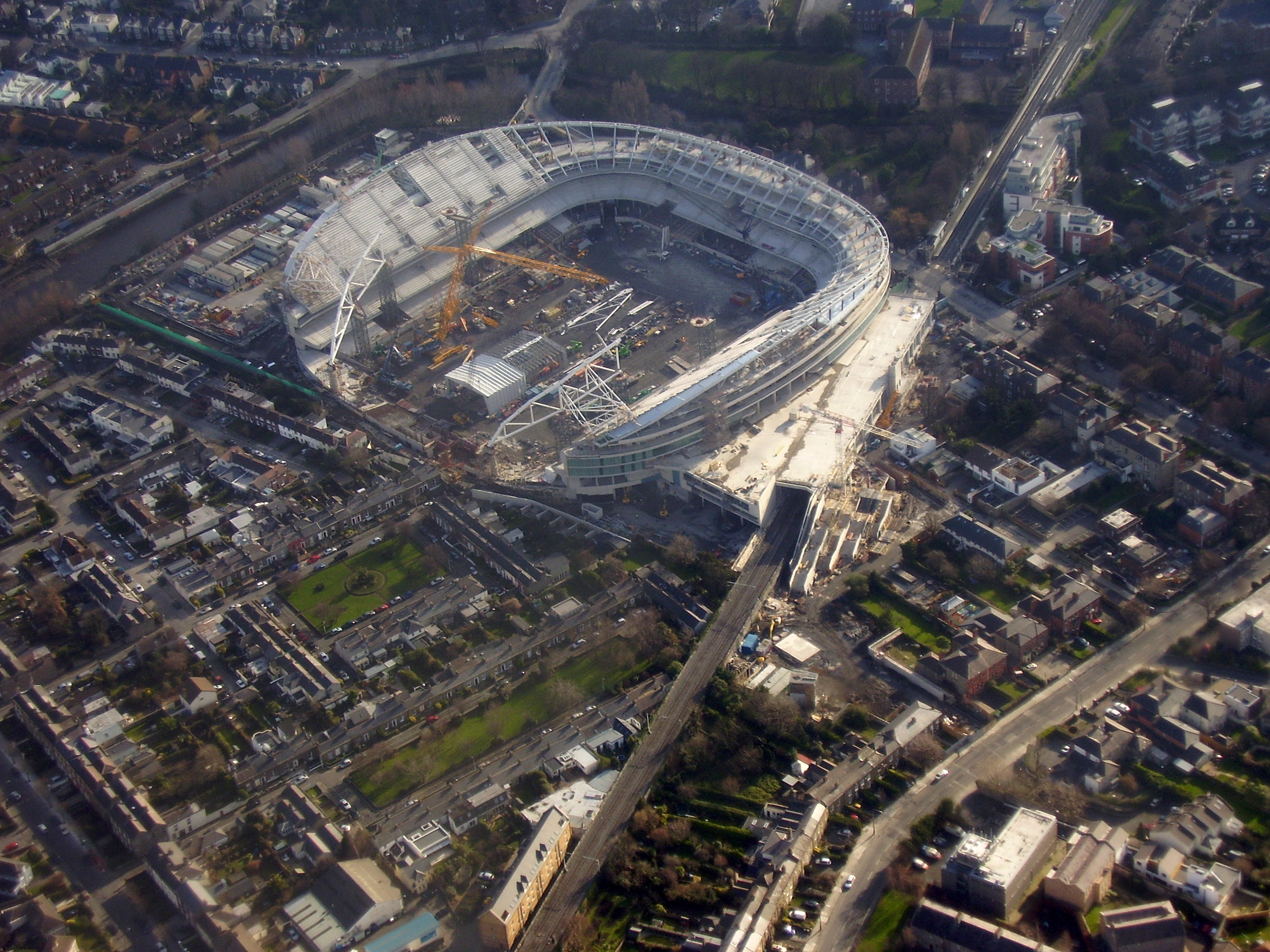 Aviva Stadium under construction